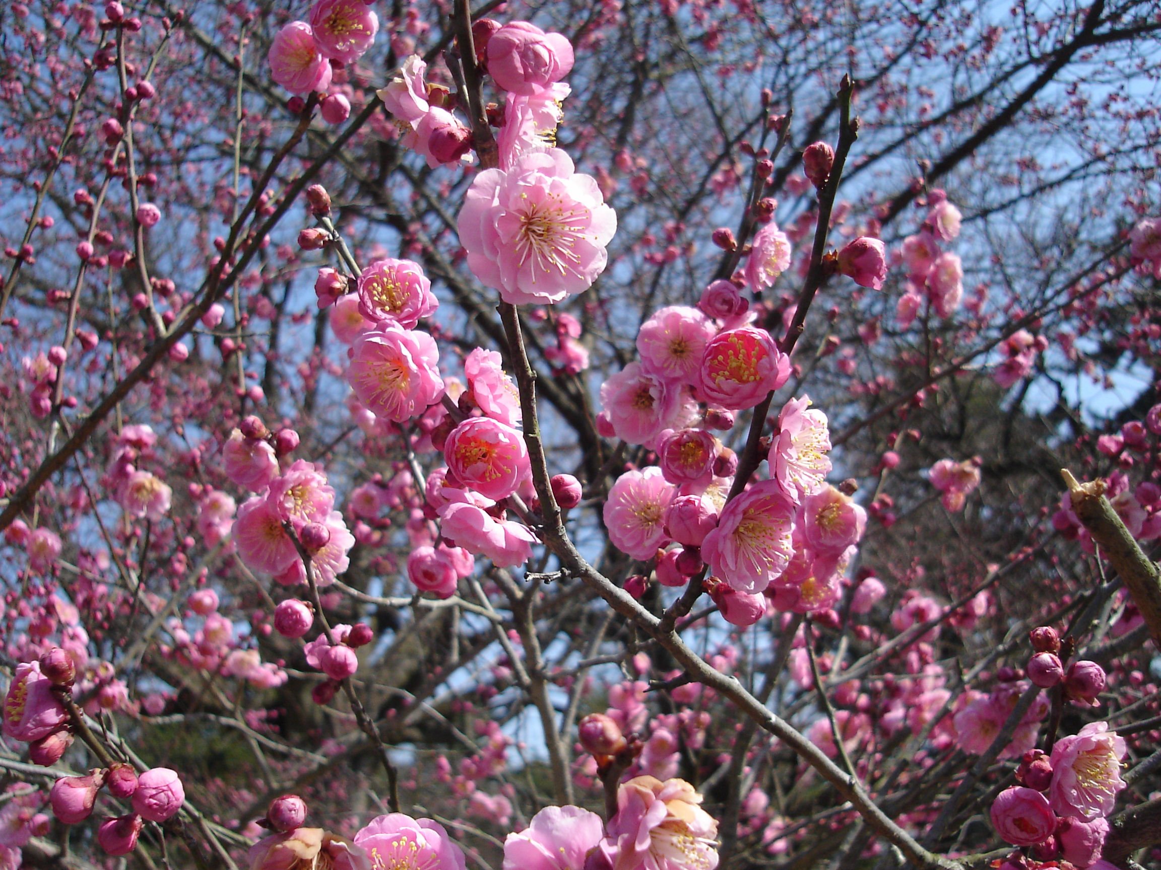 京都御苑の梅の花